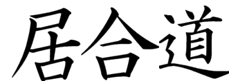 Iaido Logo Kanji